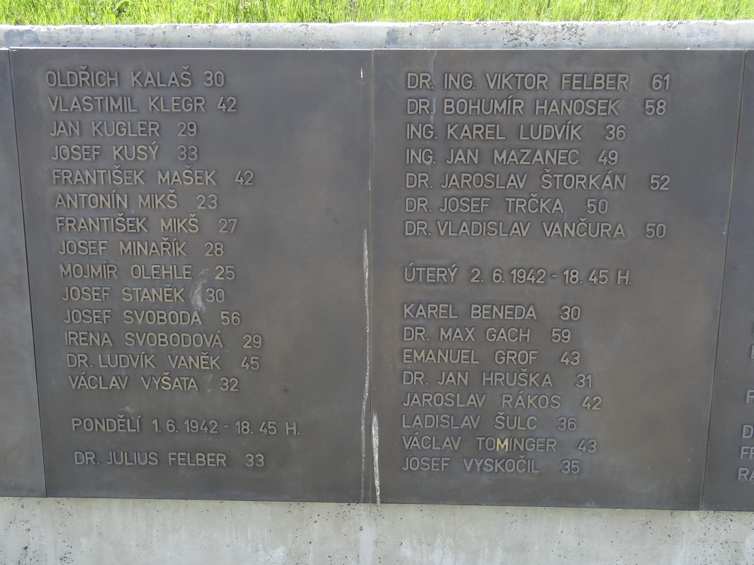 Kobyliská střelnice - pamětní desky se jmény popravených